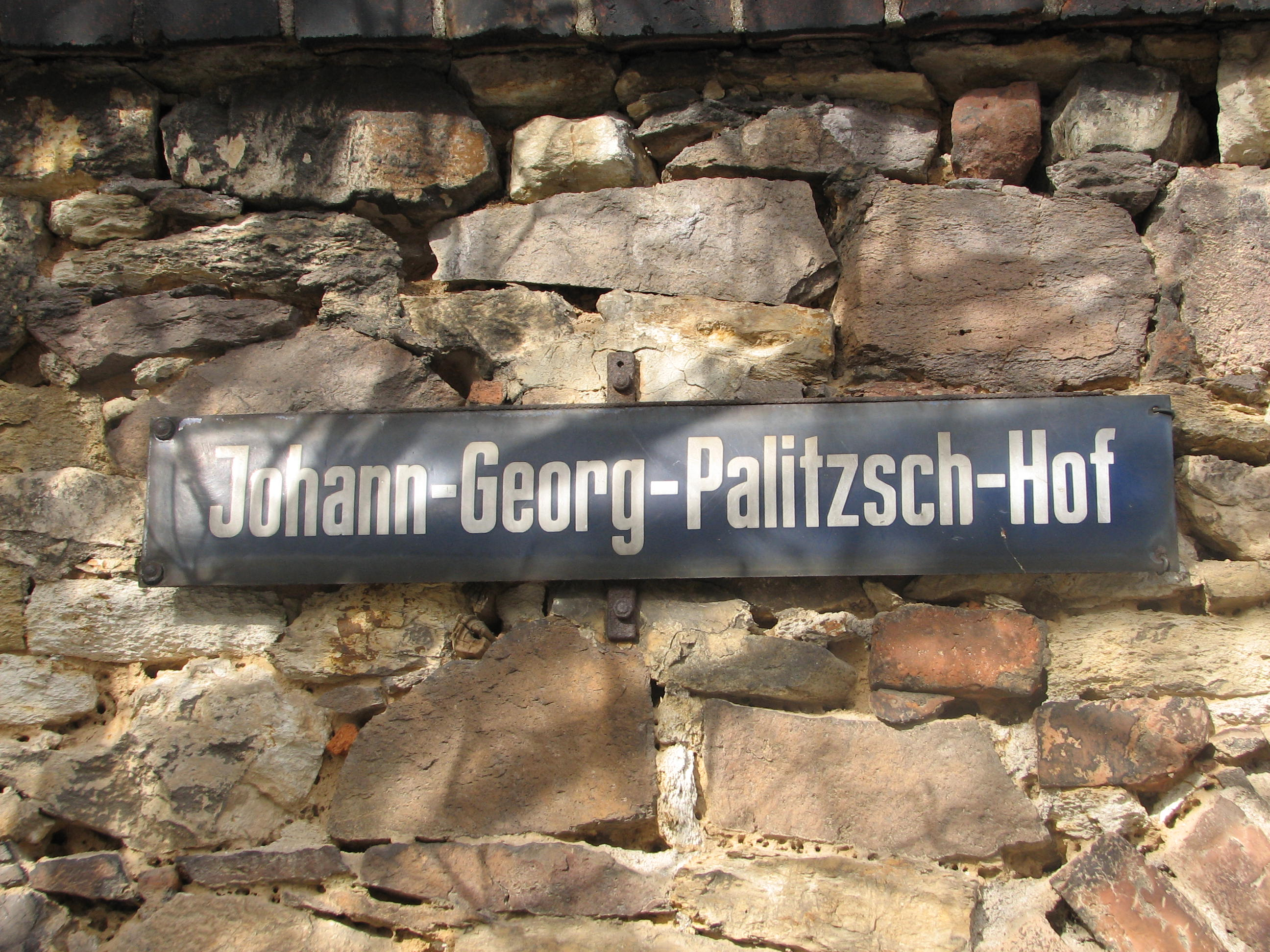 Ein Straßenschild im Stadtteil Döhlen der Stadt Freital in Sachsen. Es trägt die Aufschrift "Johann-Georg-Palitzsch-Hof" und ist an der Kirchmauer der Lutherkirche Döhlen befestigt.